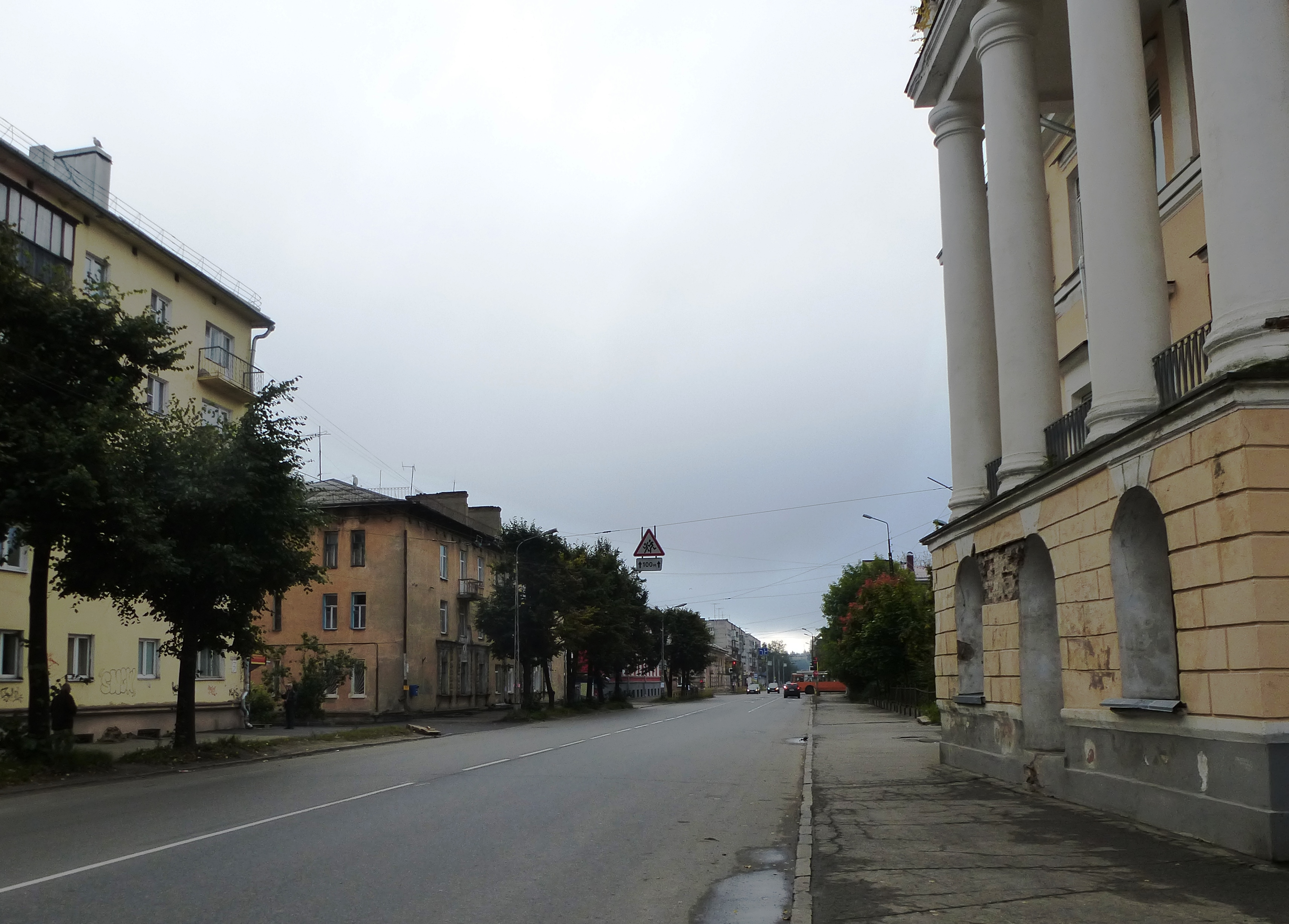 Здания на ул.Луначарского в Петрозаводске